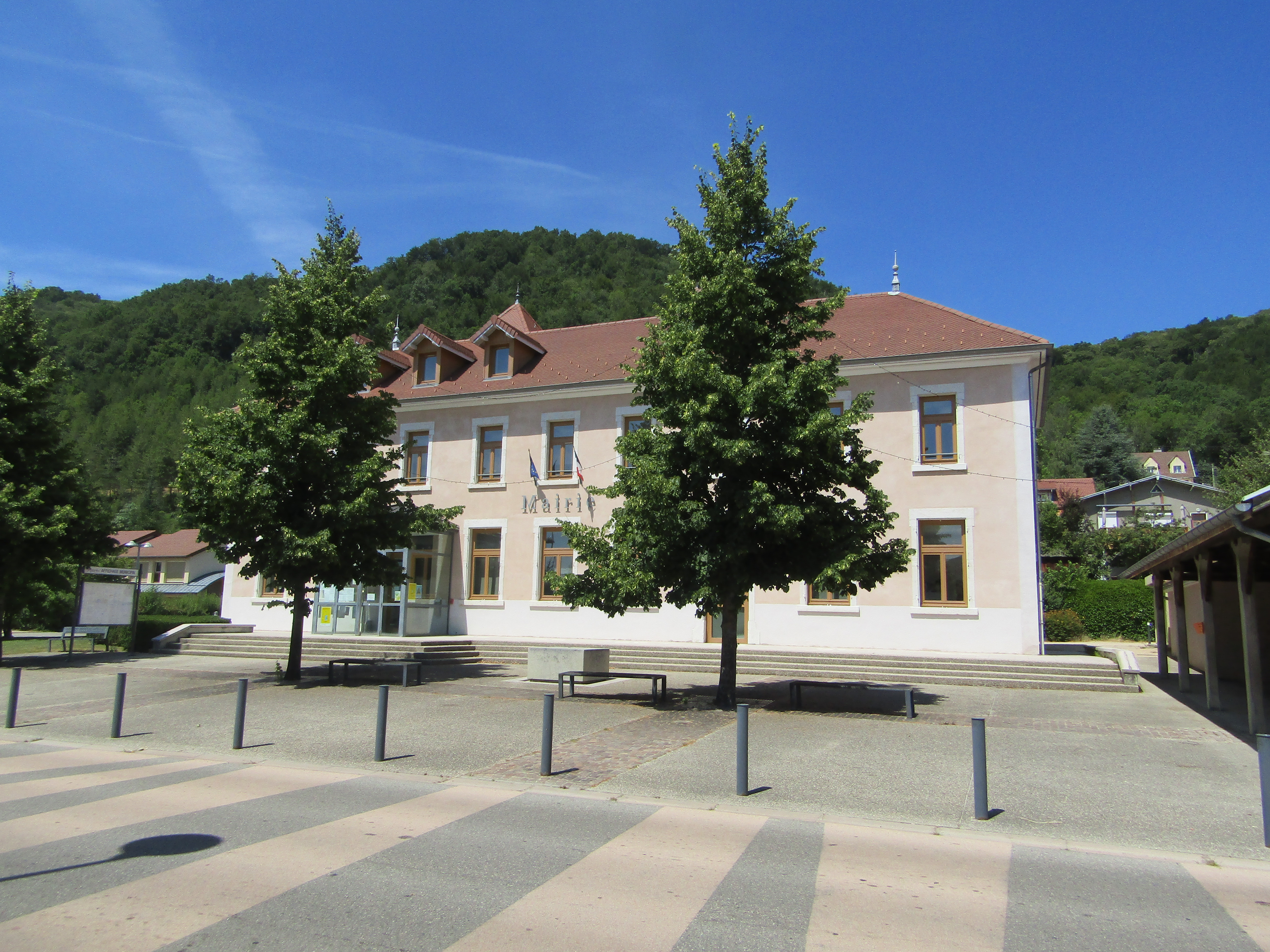 Mairie d'Apprieu